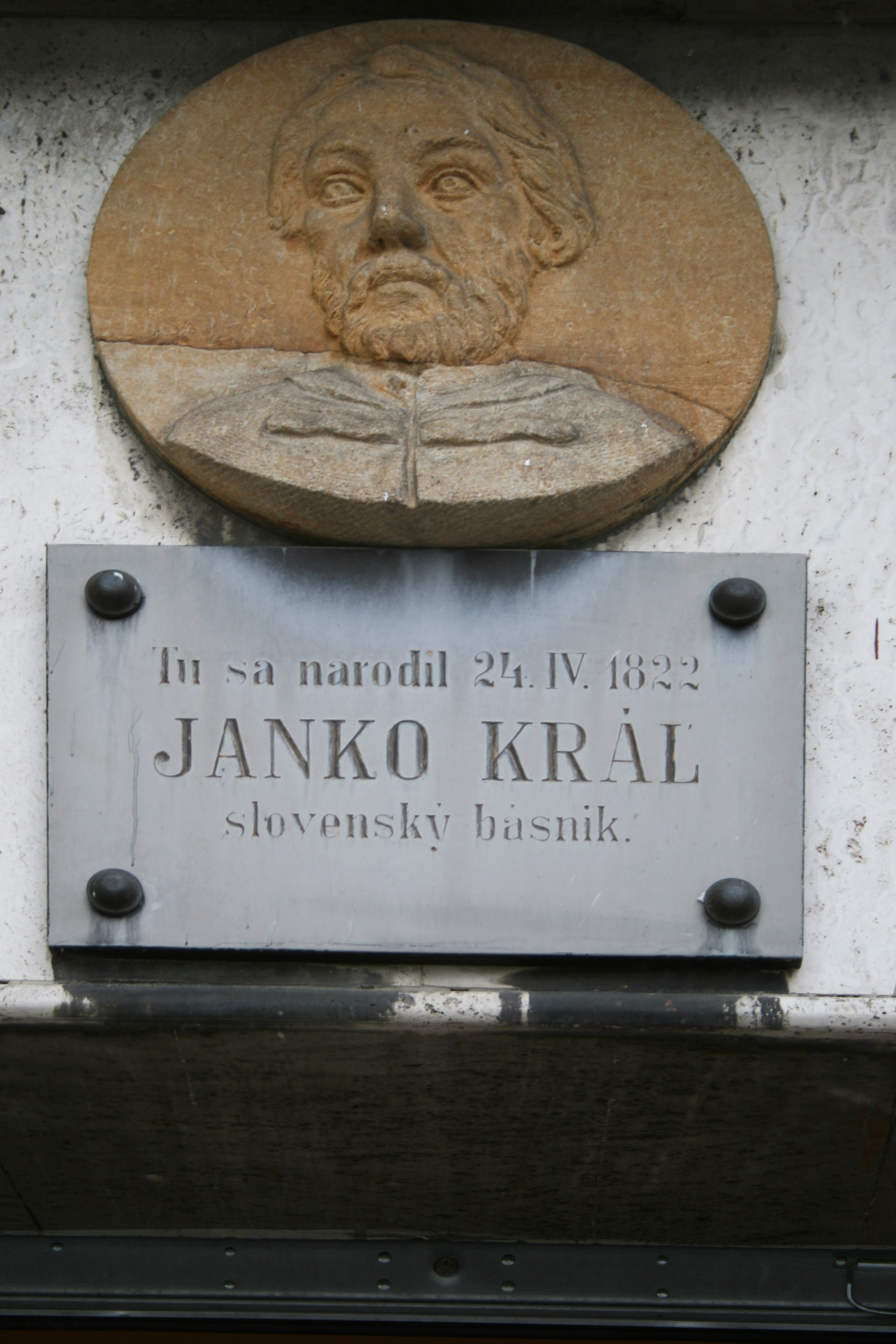 Informačná tabuľ o Jankovi Kráľovi